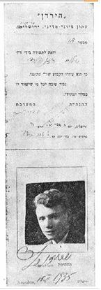 תעודת עיתונאי של שלום רוזנפלד בעיתון "הירדן" הופקה באמצע שנות השלושים של המאה ה-20